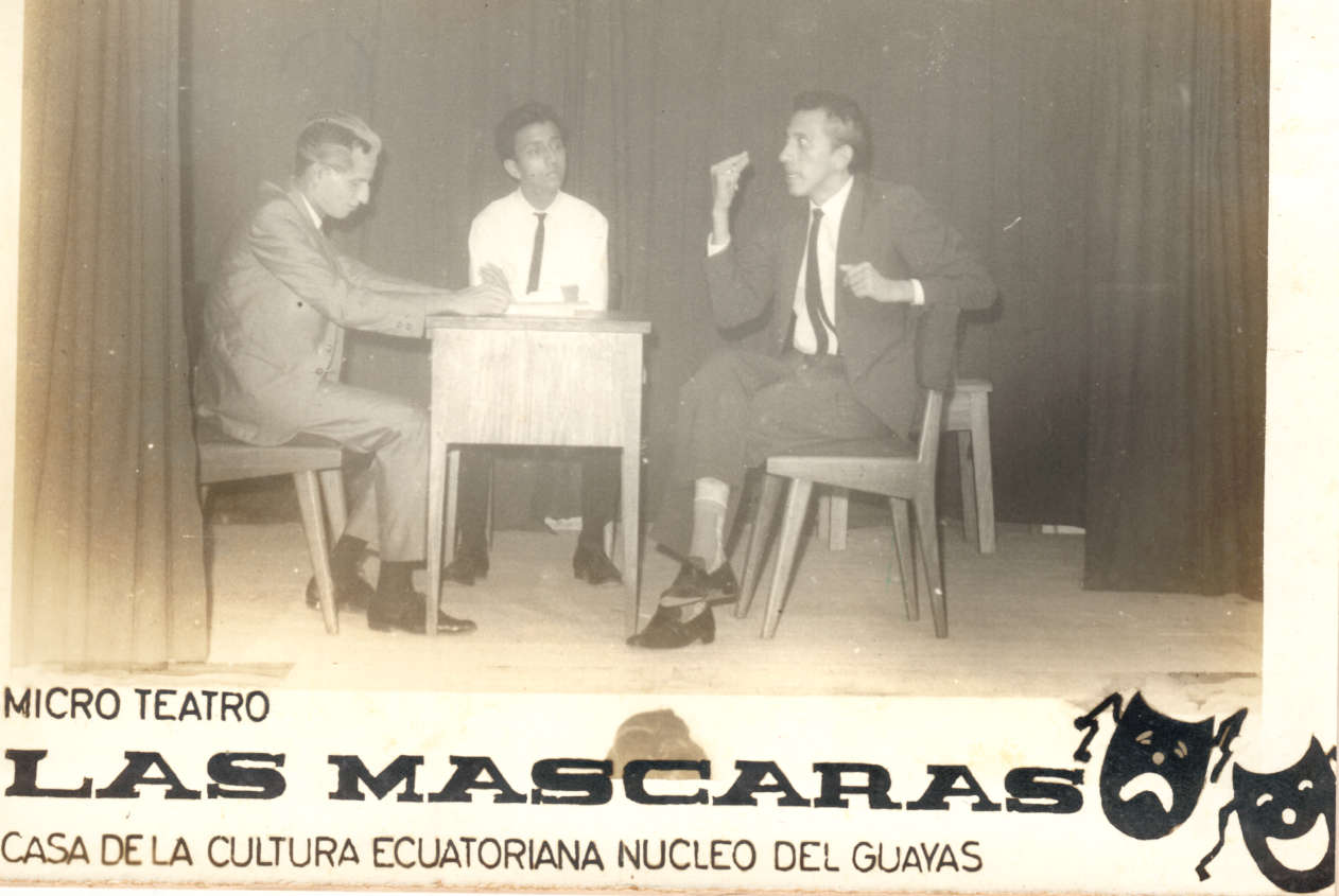 Grupo de Teatro del Maestro Felipe Navarro